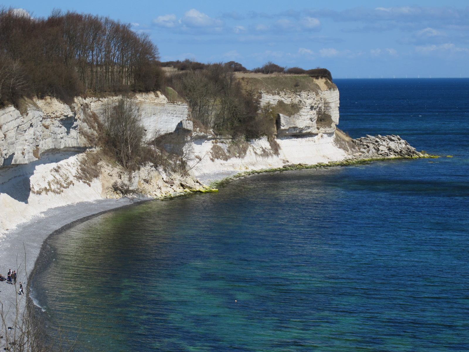 Stevns Klint, Zealand, Denmark